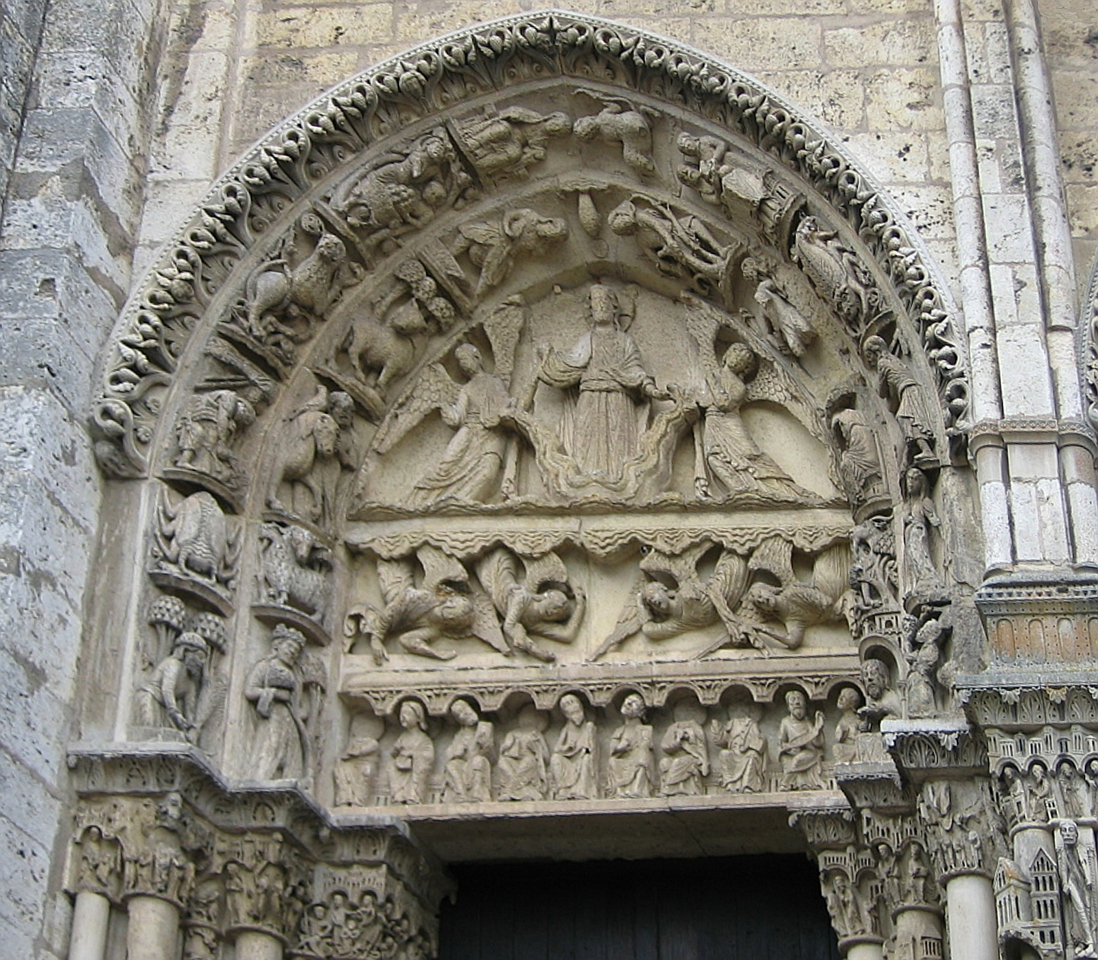 cf. source, elektronische Perspektivänderung